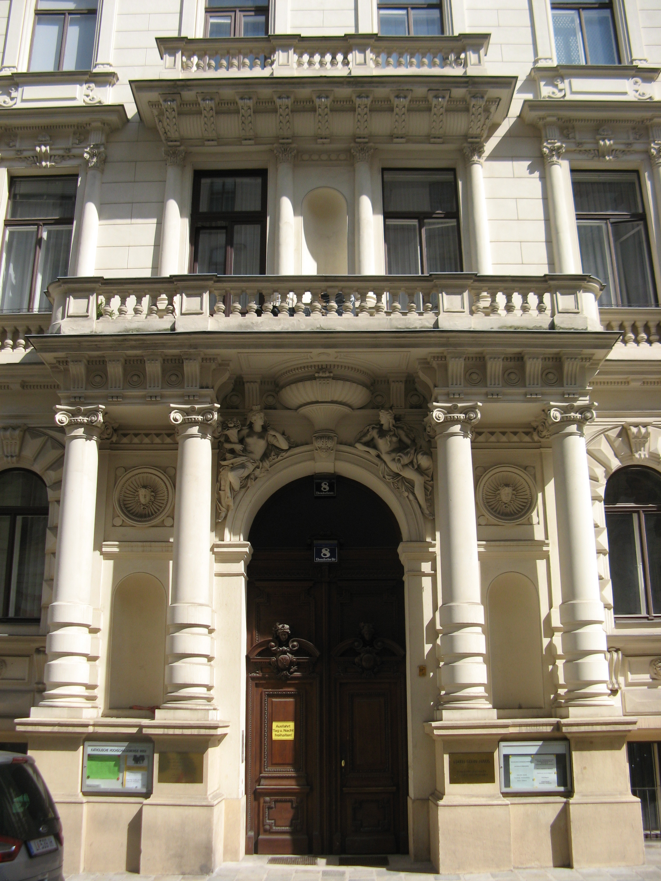 Haus (1883-84) von Wilhelm Stiassny, Ebendorferstraße 8, Wien-Innere Stadt